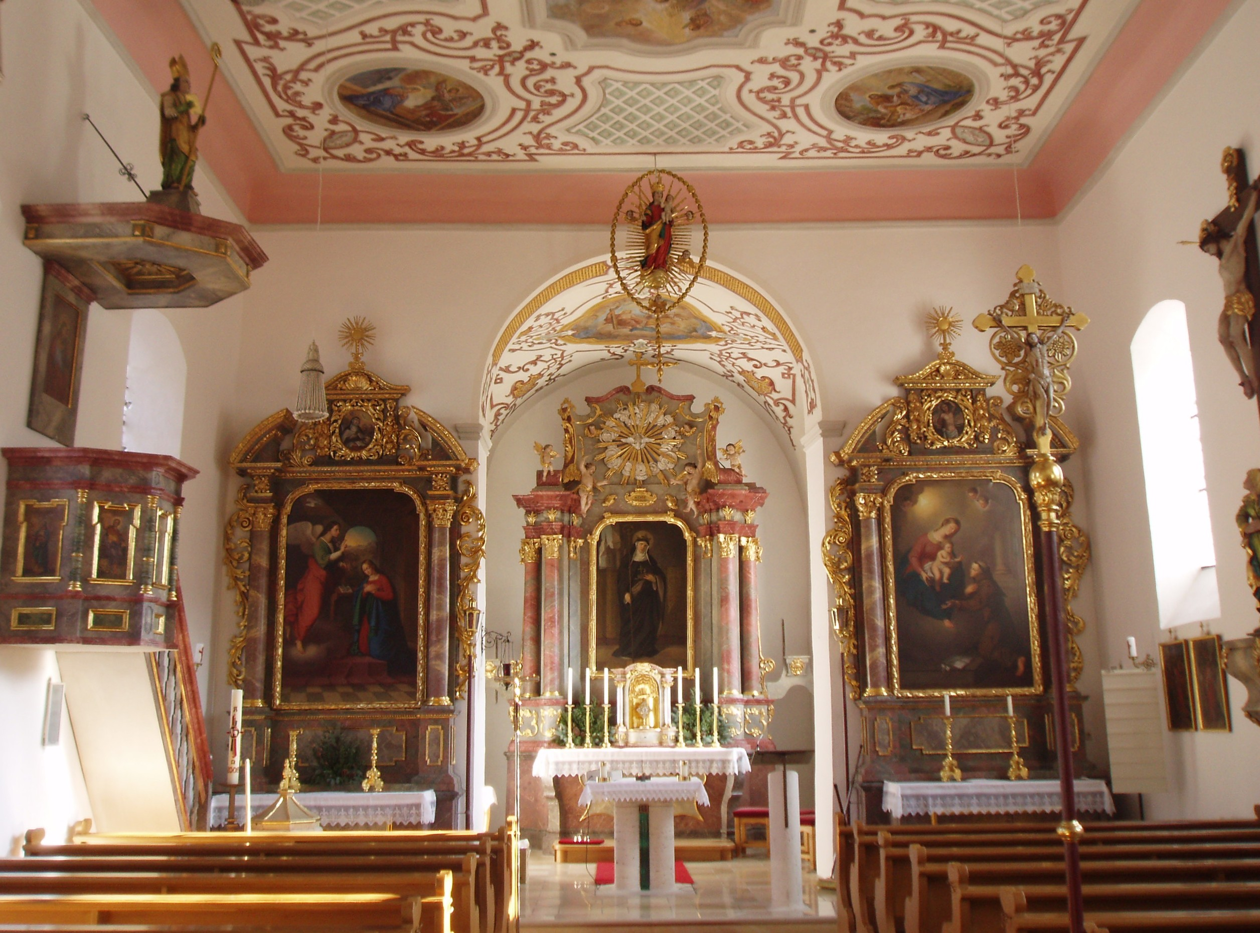 Morsbach_Gemeinde_Titting_Landkreis_Eichstätt,_Kirche_innen